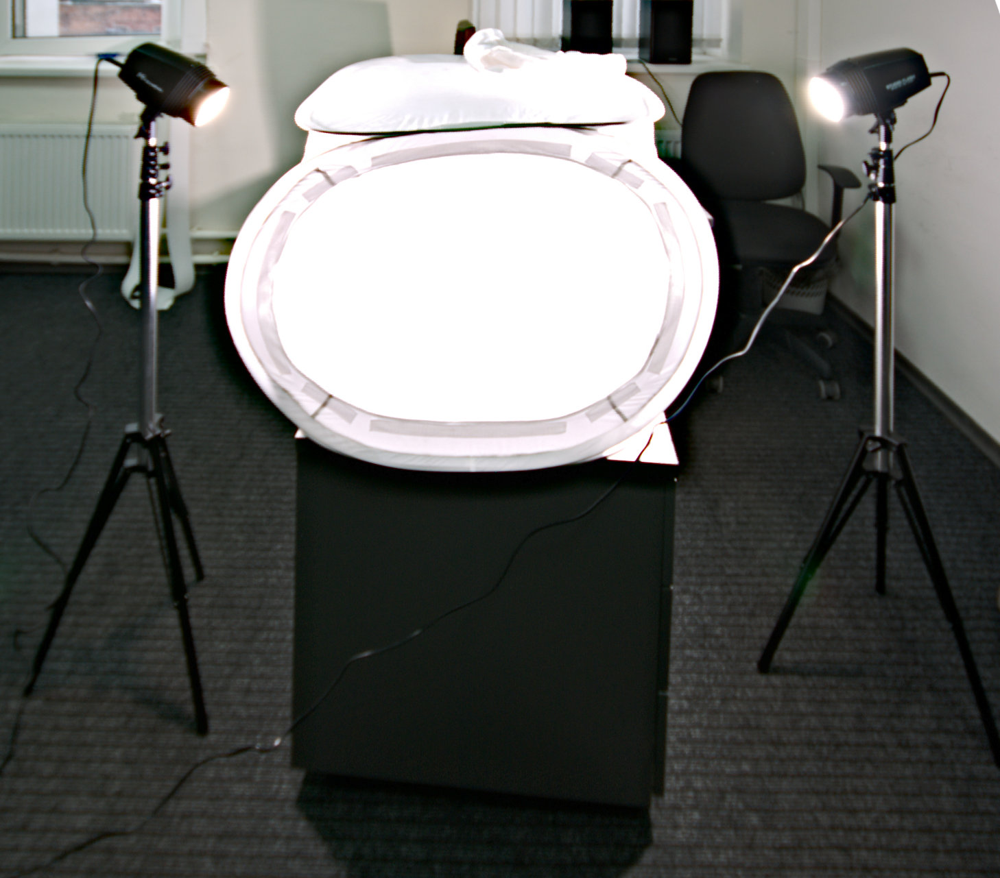 Бестеневой бокс в момент срабатывания вспышки